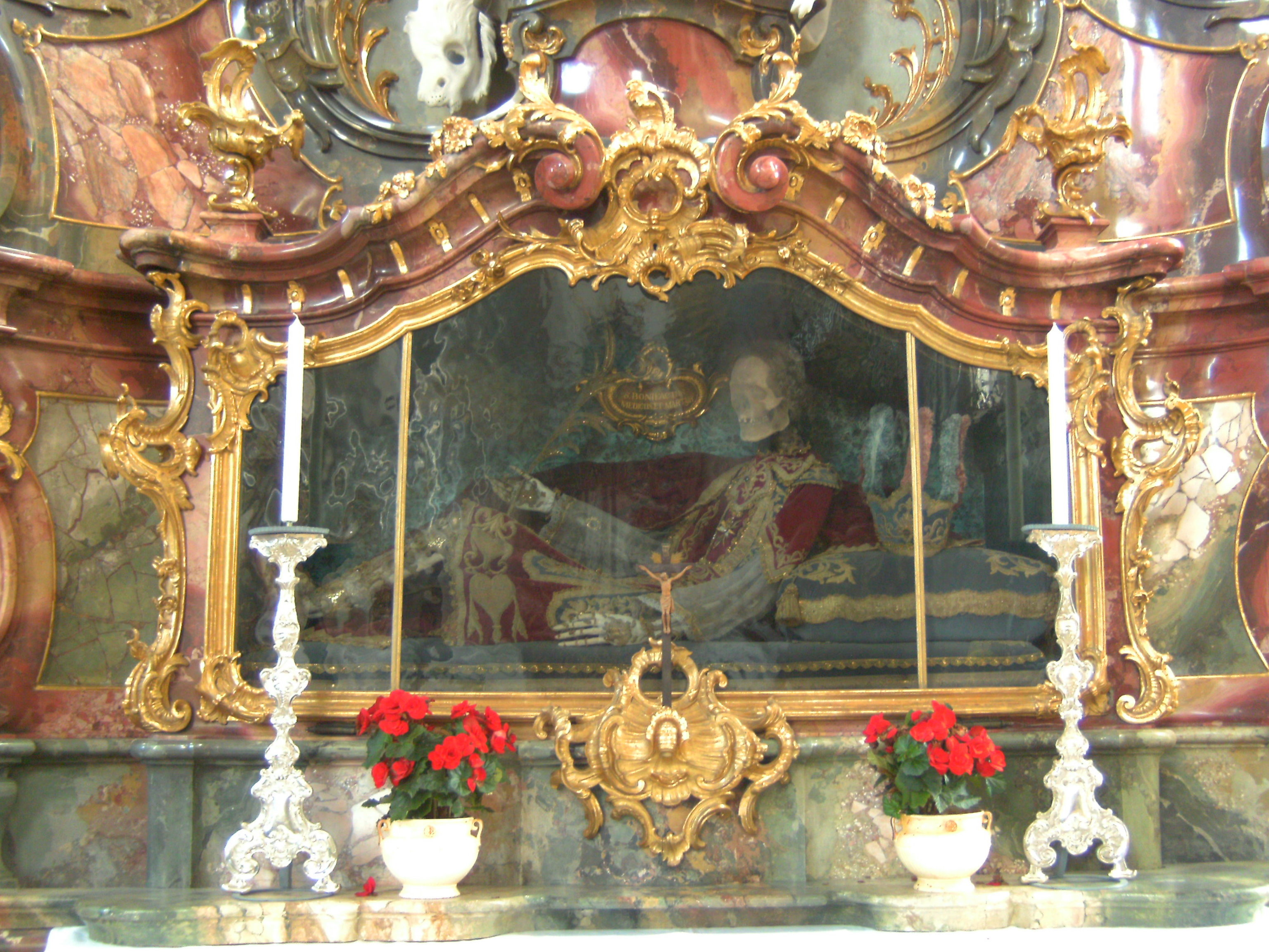 Reliquienschrein des Heiligen Alexander von Rom (Märtyrer)